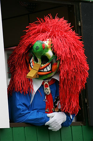 Basler Fasnacht 05: Waggis